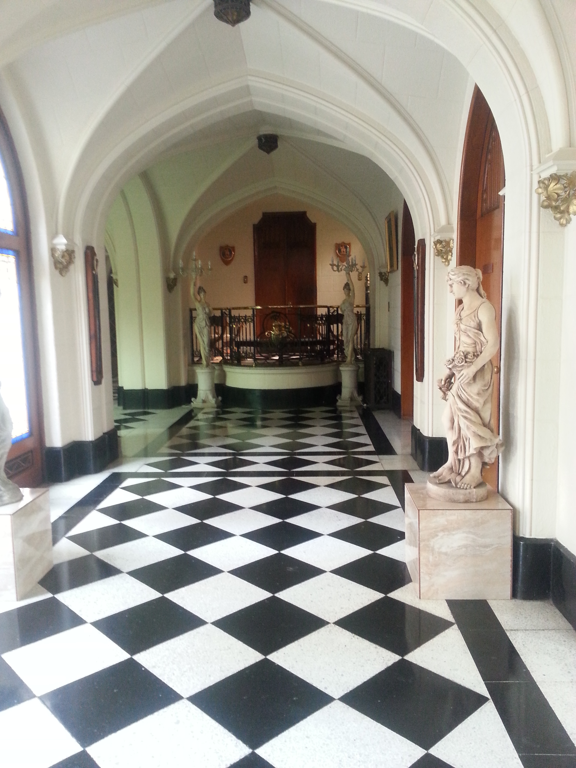 Corredor central primer piso de palacio Ortúzar en Ñuñoa, Santiago de Chile.